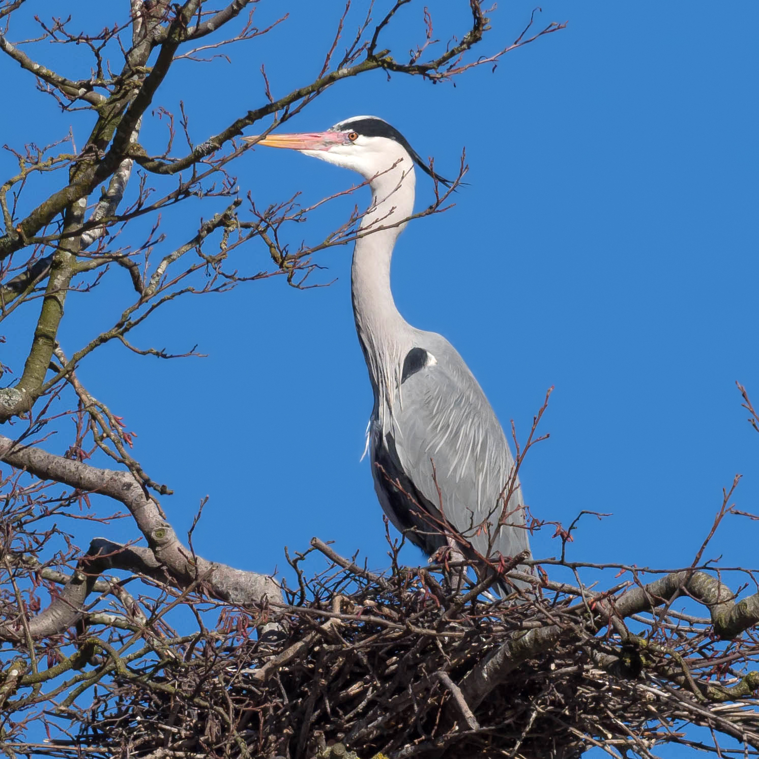 Gråhäger, Grey heron, Ardea cinerea, Djurgården, Stockholm, Sweden